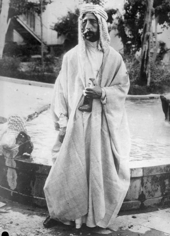 Ein armer König! Kein Weihnachts-Märchen. König Feisal vom Irak, dessen Staat das jüngste Mitglied des Völkerbundes ist, gilt als einer der ärmsten Herrscher. Durch den Verlust seines Landes an Ibn Saud, verlor er 80 Millionen Mark. Er liess sich vom Gericht bankrott erklären, als ein Schuster die Bezahlung für ein Paar Schuhe verlangte.